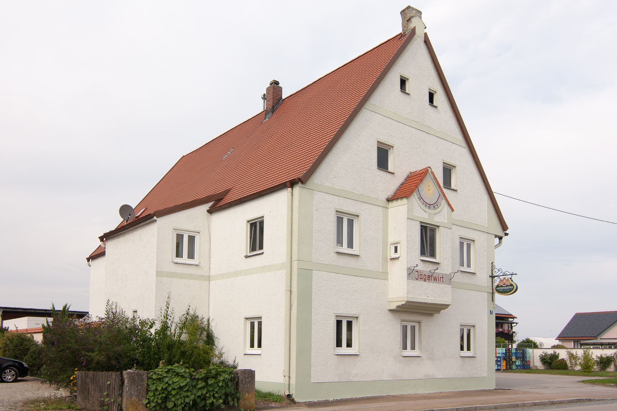 Gasthof zum Jägerwirt; Hälfte 18. JahrhundertThis is a photograph of an architectural monument.